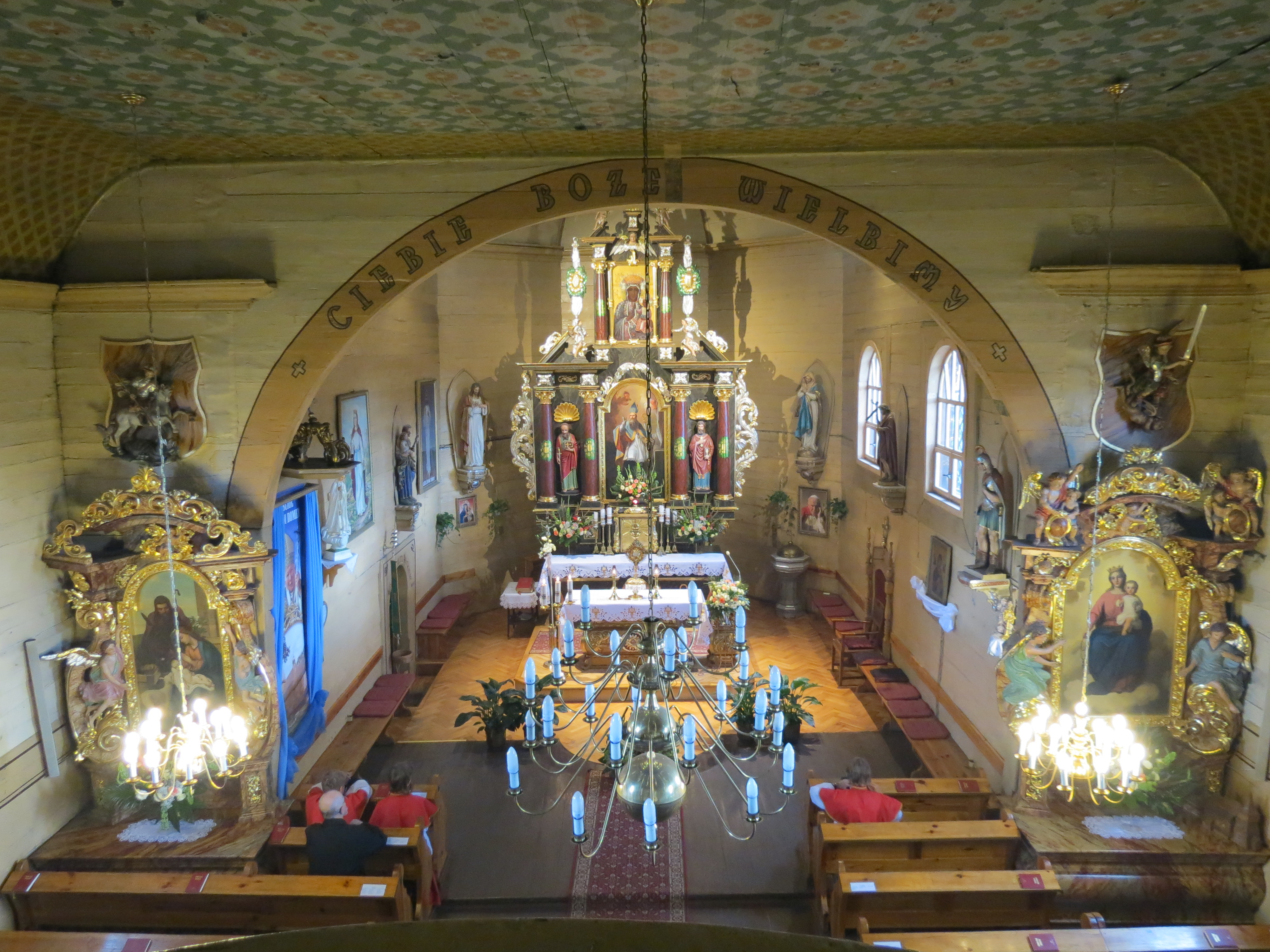 Kościół drewniany p. w. św. Mikołaja; Wilcza, ul. K. Miarki, gmina Pilchowice, powiat gliwicki